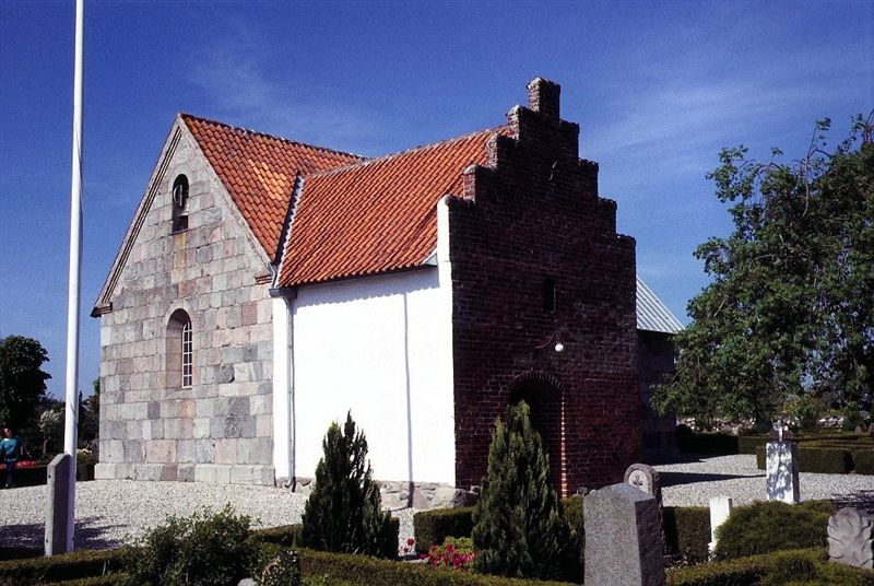 Mellerup Kirke i Danmark. Kirken set fra sydvest